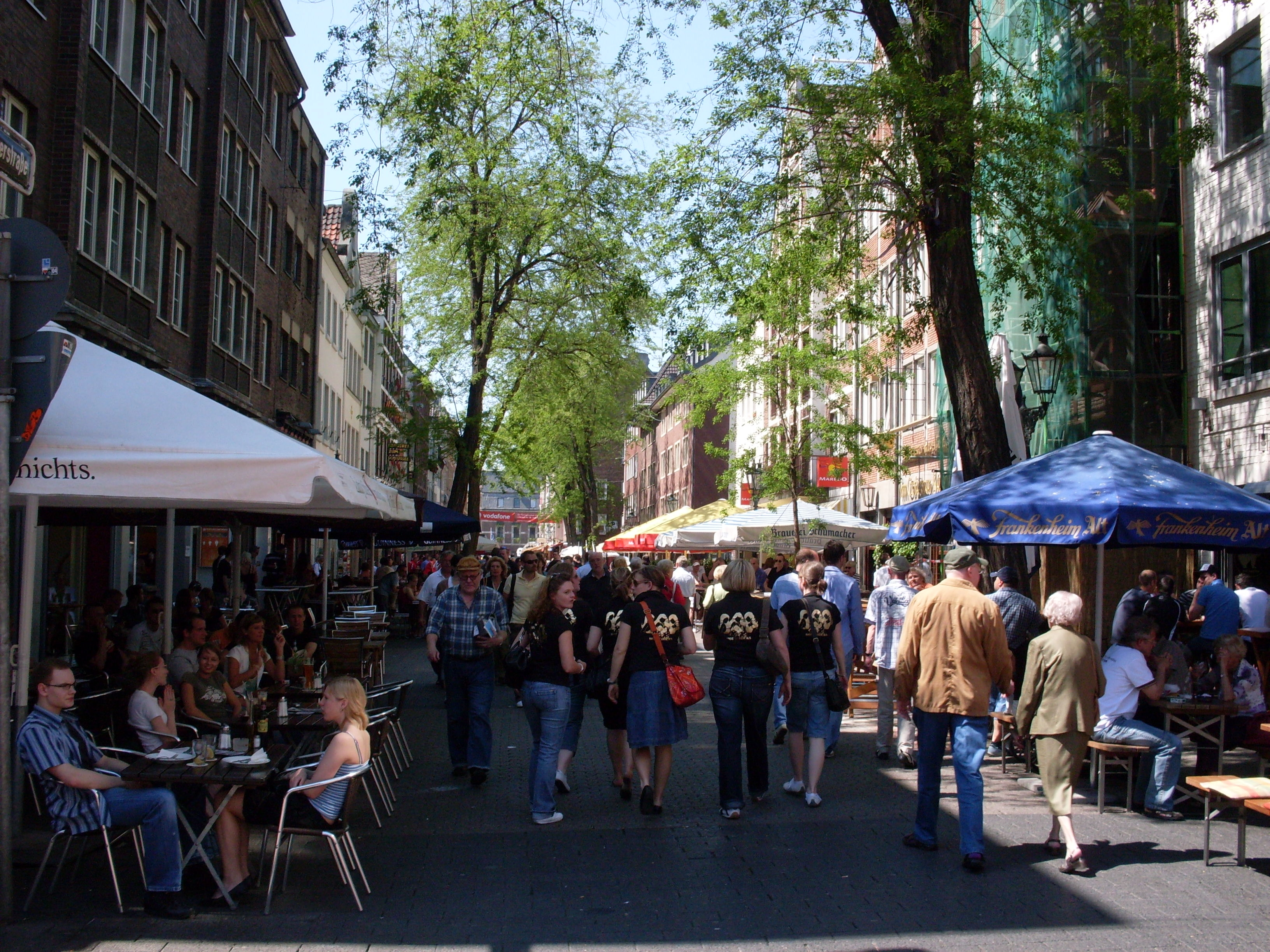 Düsseldorf Bolkerstraße